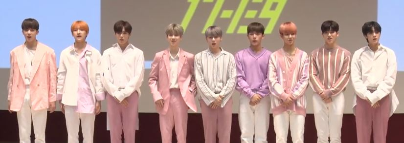 그룹 ‘원더나인’의 첫 번째 미니앨범 'XIX' 발매기념 팬사인회가 20일 오후 서울 양천구 한국방송회관 코바코홀에서 열렸다.